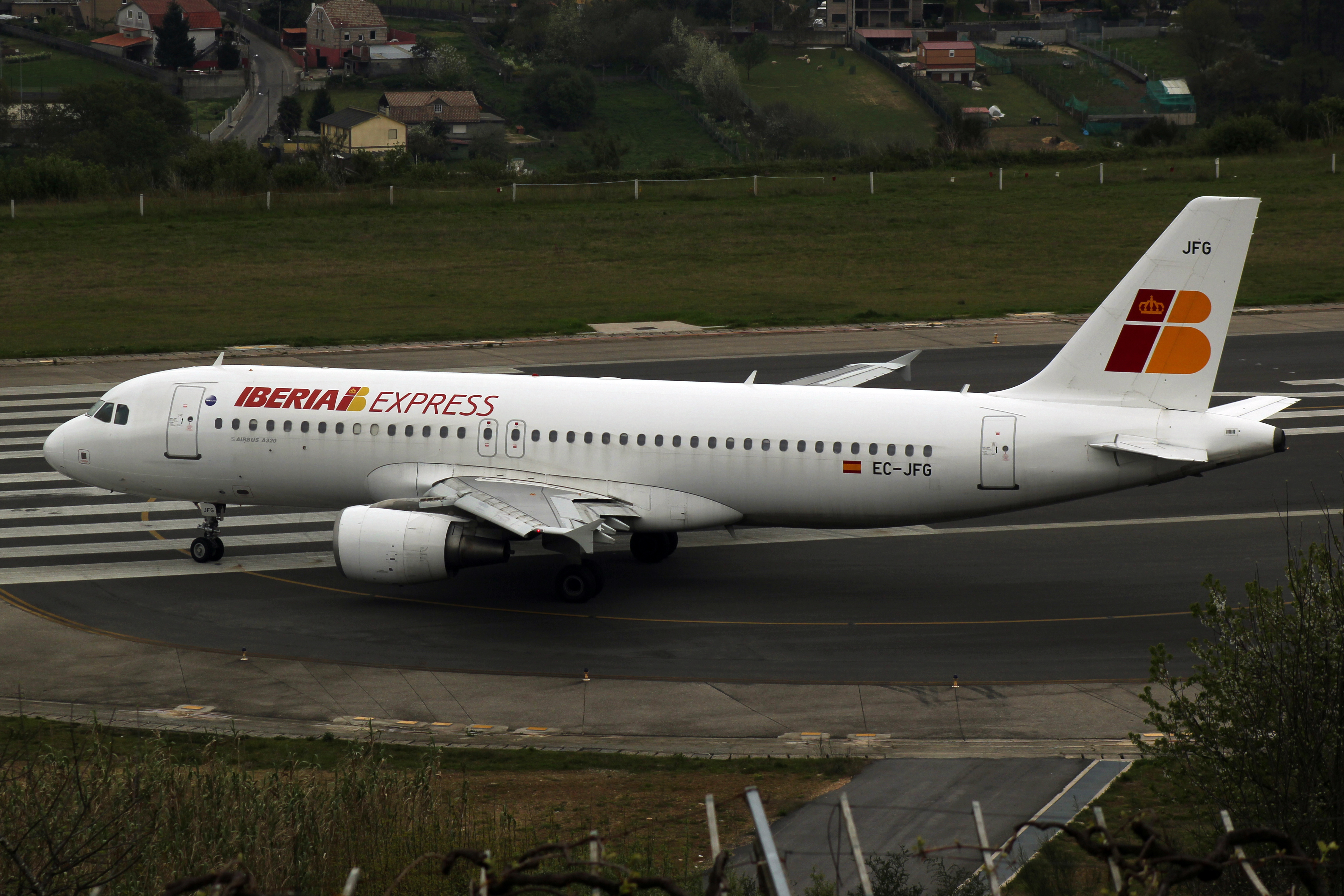 Airbus A320 de Iberia Express preparándose para despegar do aeroporto de Vigo.